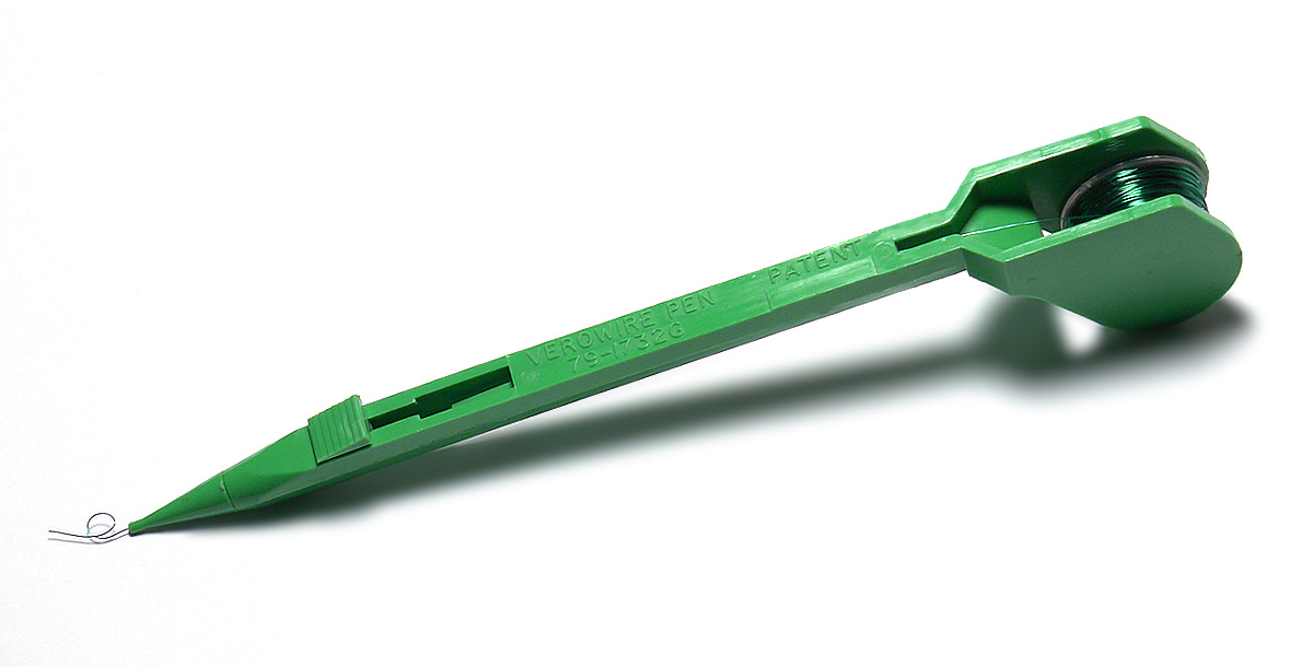 Fädeltechnik: Fädelstift zum verdrahten von elektronischen Schaltungen. Länge 15 cm.